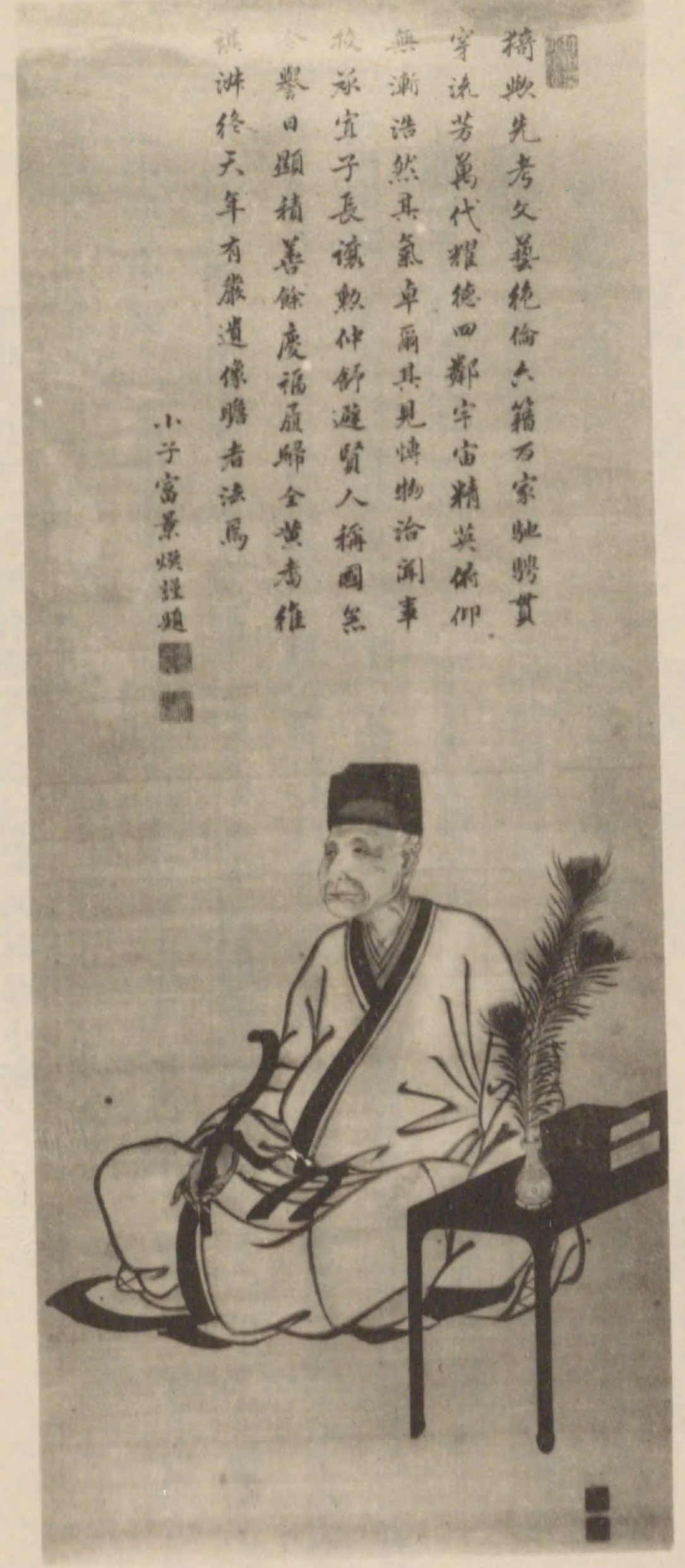 『石川県史 第参編』（石川県編、1929年（昭和4年）12月、石川県）より引用。石川県金沢市慈雲寺蔵。